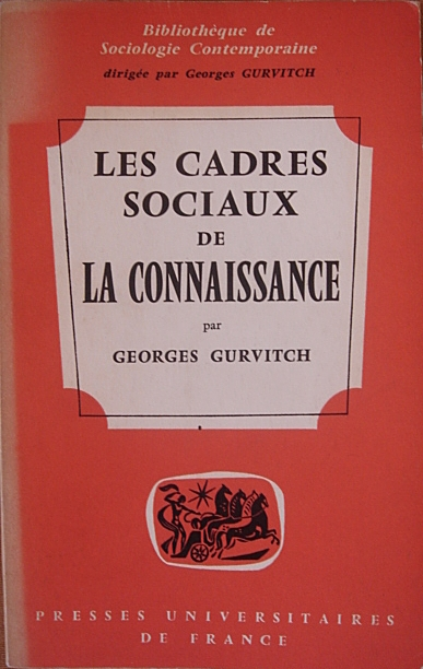 Couverture du livre de Georges Gurvitch, Les Cadres sociaux de la connaissance